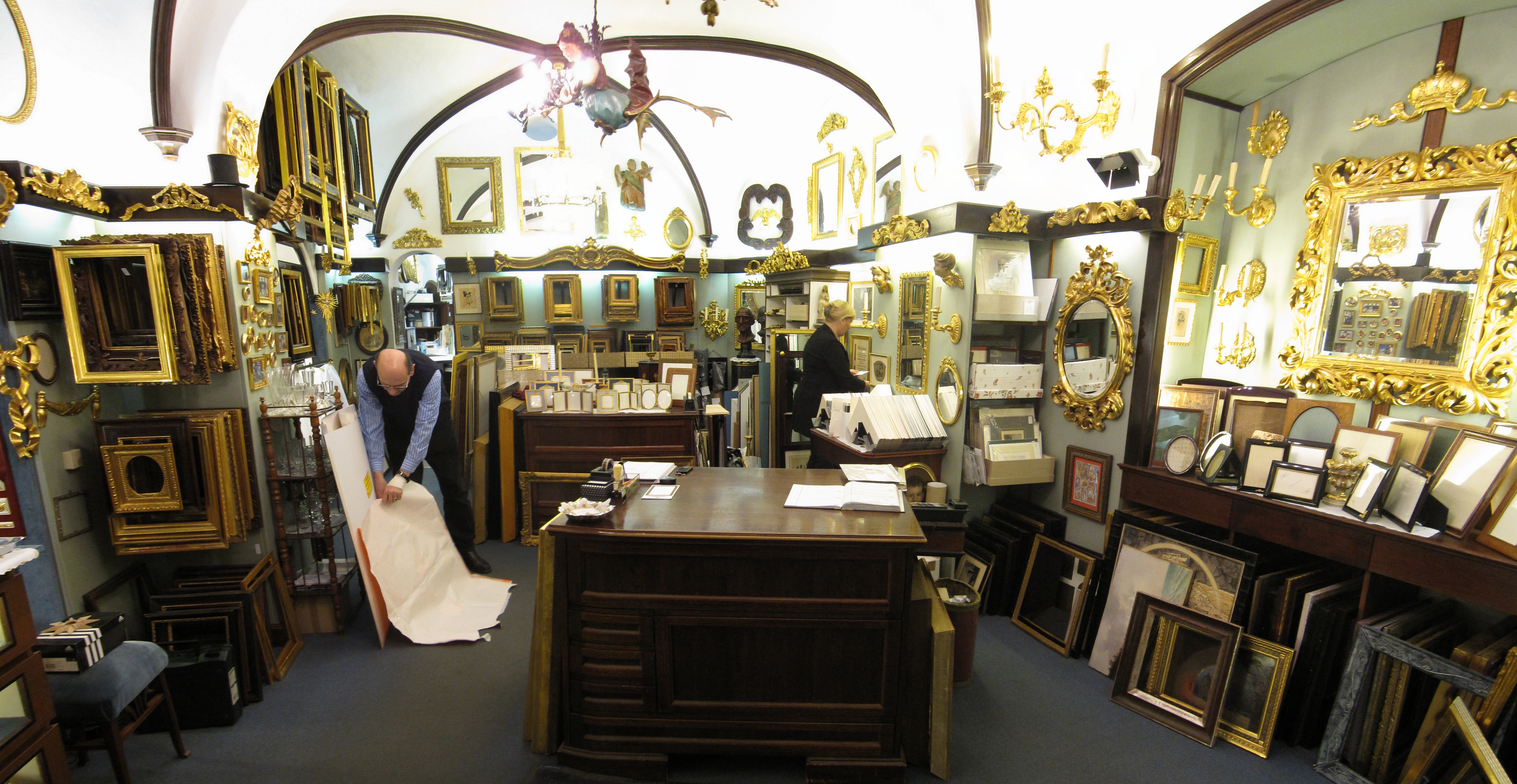 C. Bühlmayer